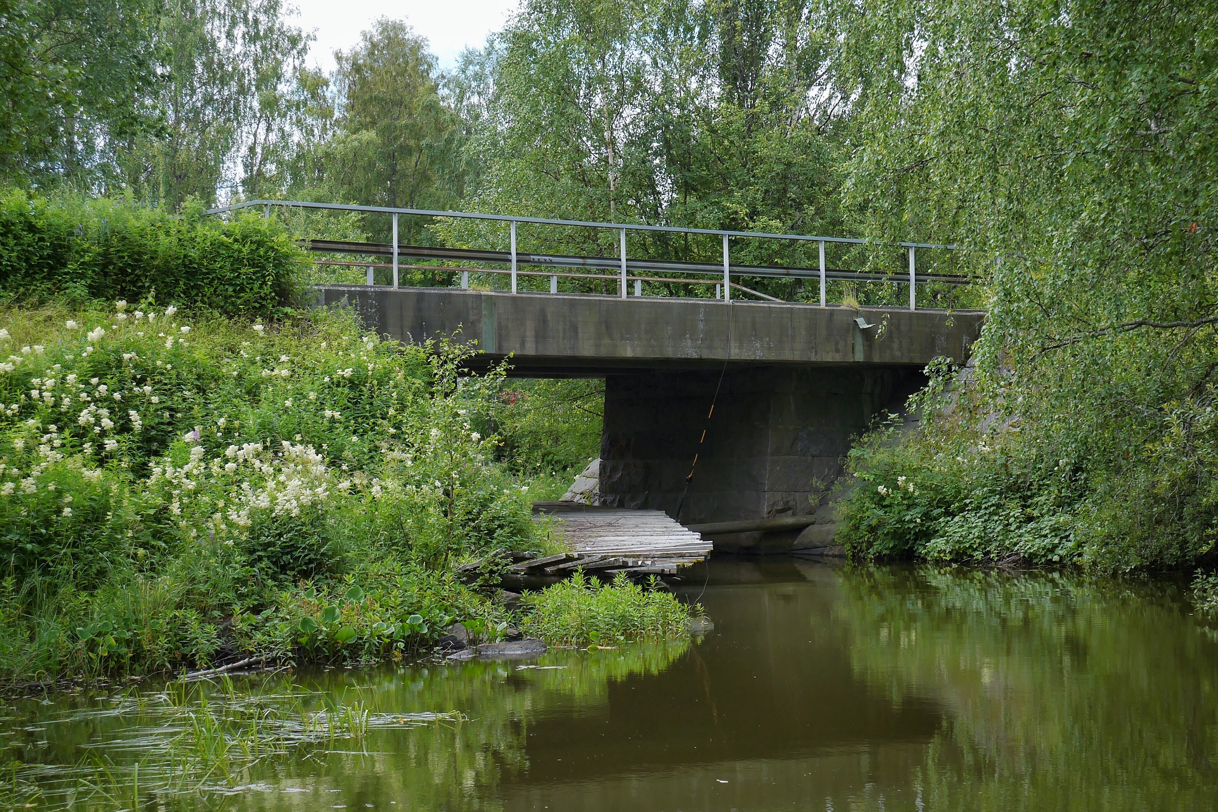 Bro över Vittjärvsträskets utlopp i Vittjärv, Boden. Bron är klassad som kulturhistoriskt värdefull. Bronummer: BD 287 Byggår: 1935. Längd: 13,5 meter Spännvidd: 5,9 meter Bredd: 7,0 meter